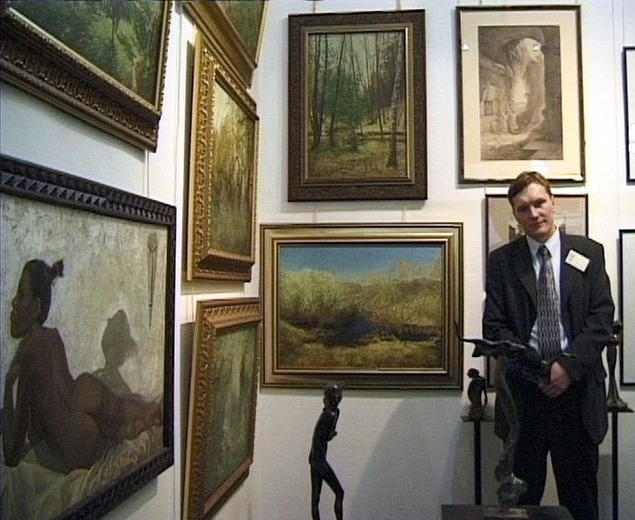 Е. А. Богатов на выставке в Манеже